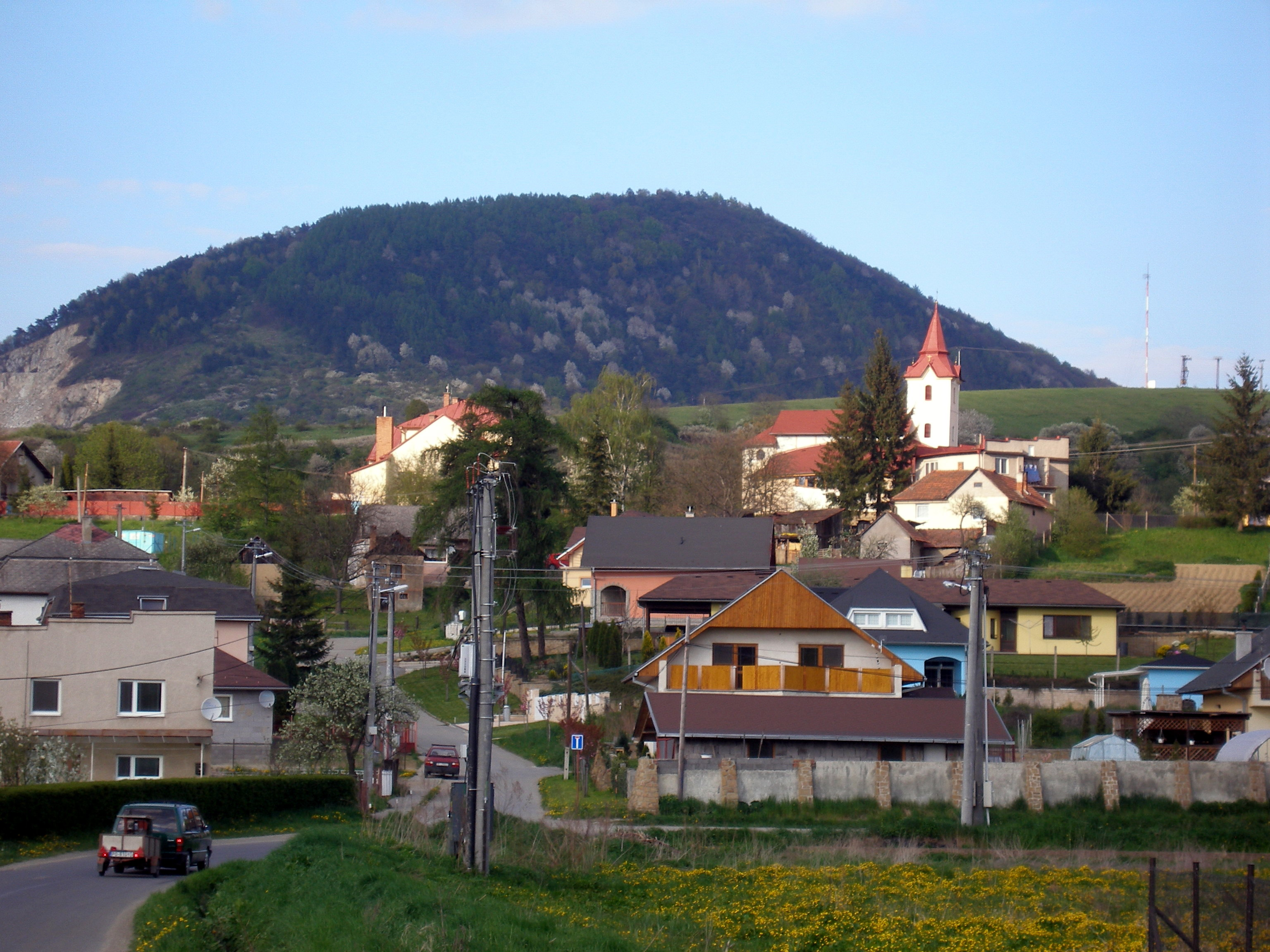 V pozadí kopec Lysá Stráž (697 m nad morom.)Obec Gregorovce okres Prešov región Šariš